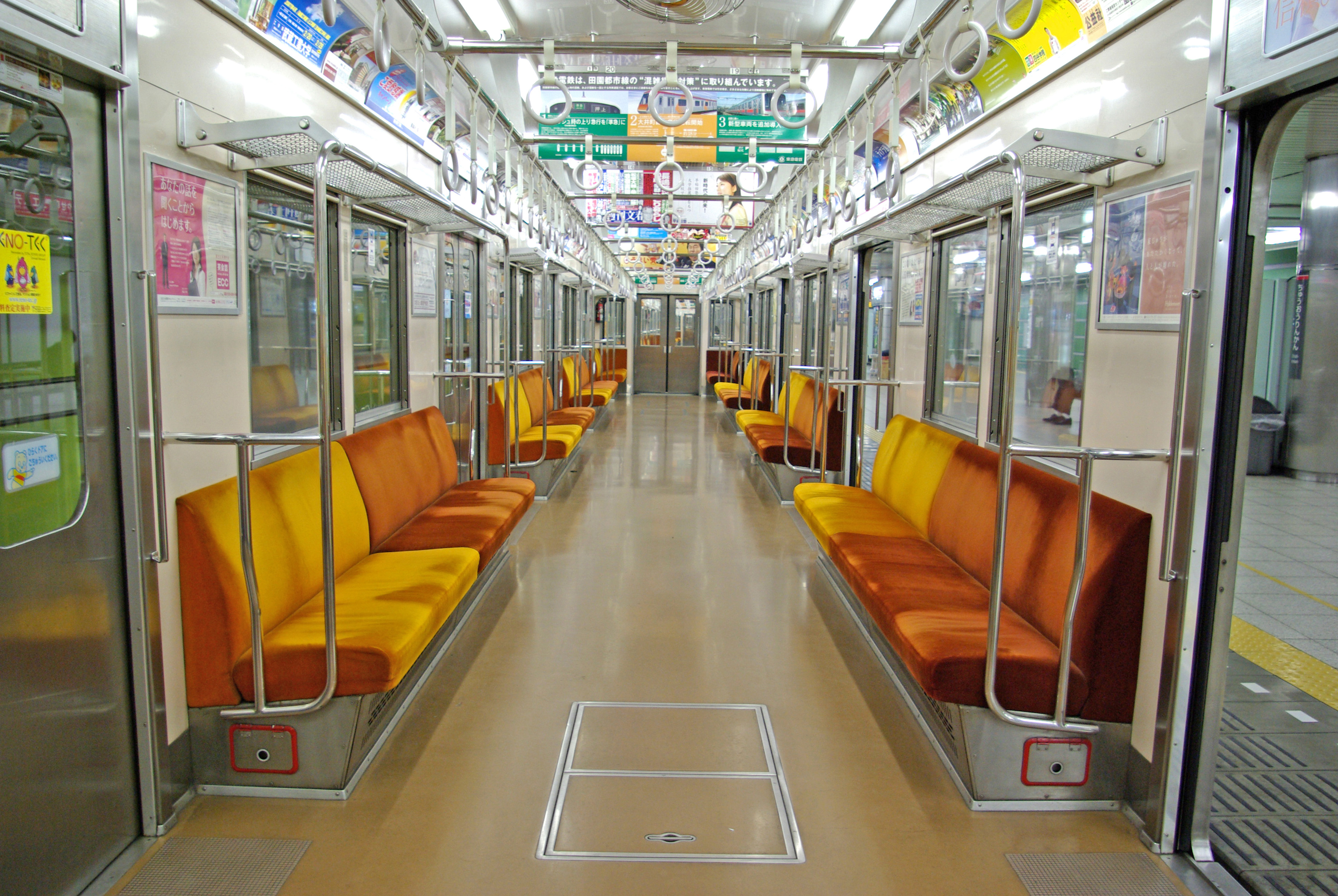 東急8500系 デハ8891号（17-2次車）車内